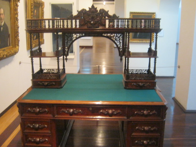 Siglo XIX Cedro y pino taponado, decorado con tallas aplicadas y calados en la madera. Estilo victoriano, construido bajo las especificaciones del presidente Núñez.